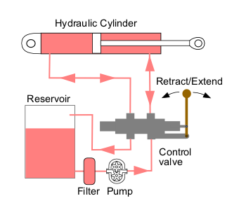 Hydraulic circuit, directional control